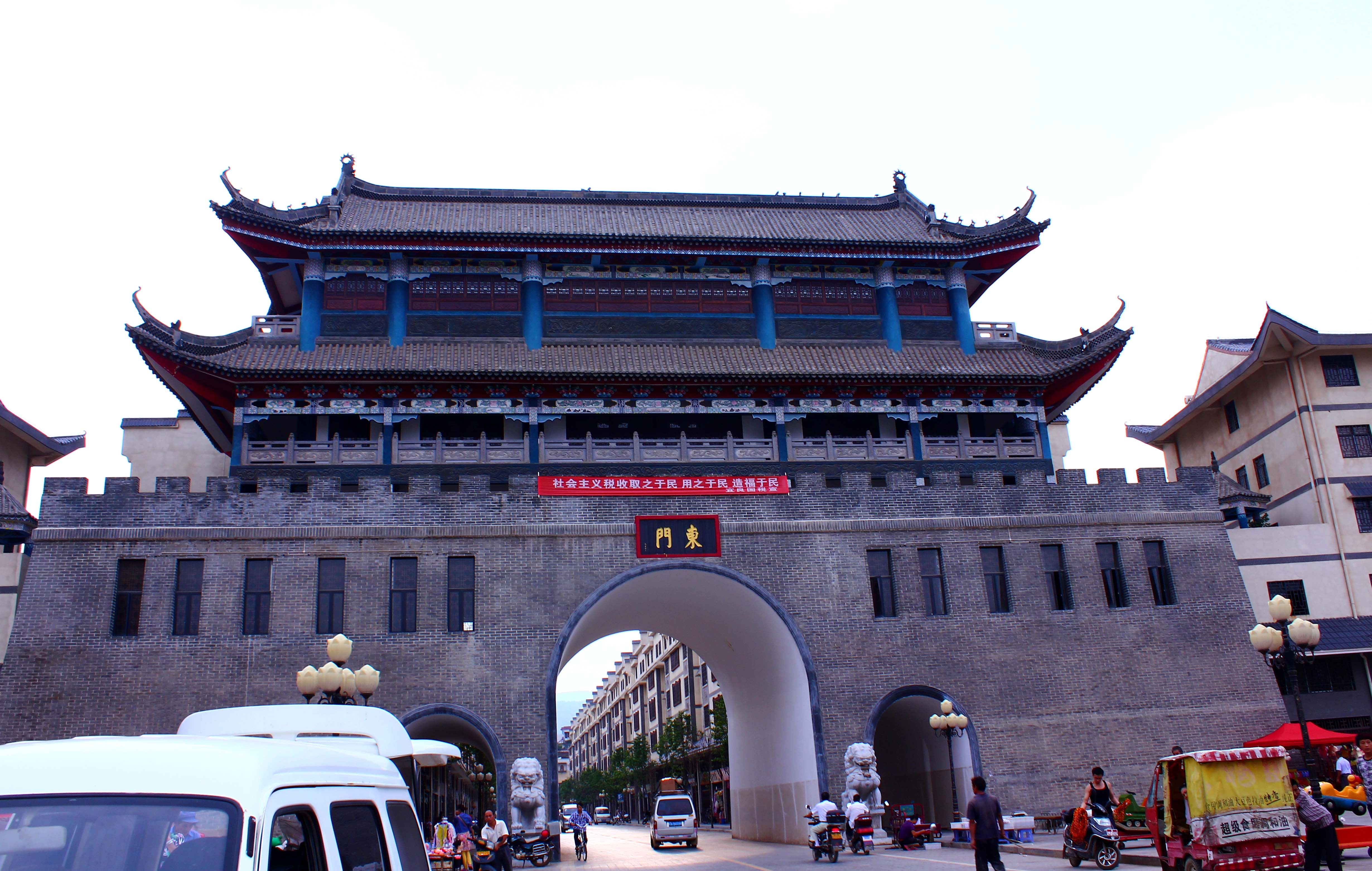 云南省昆明市宜良县东门广场